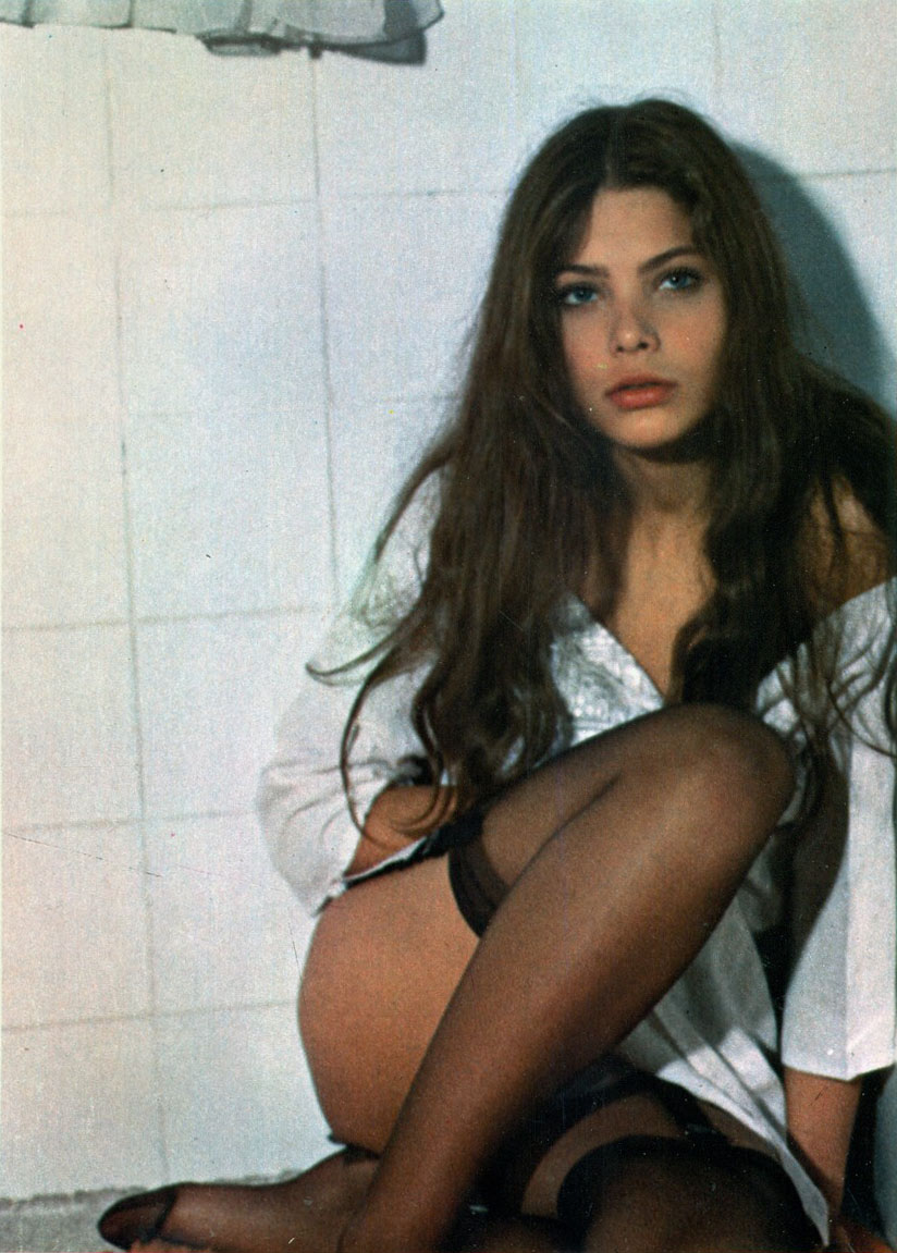 L'attrice italiana Ornella Muti in uno scatto di scena sul set del film Appassionata (1974) di Gianluigi Calderone.